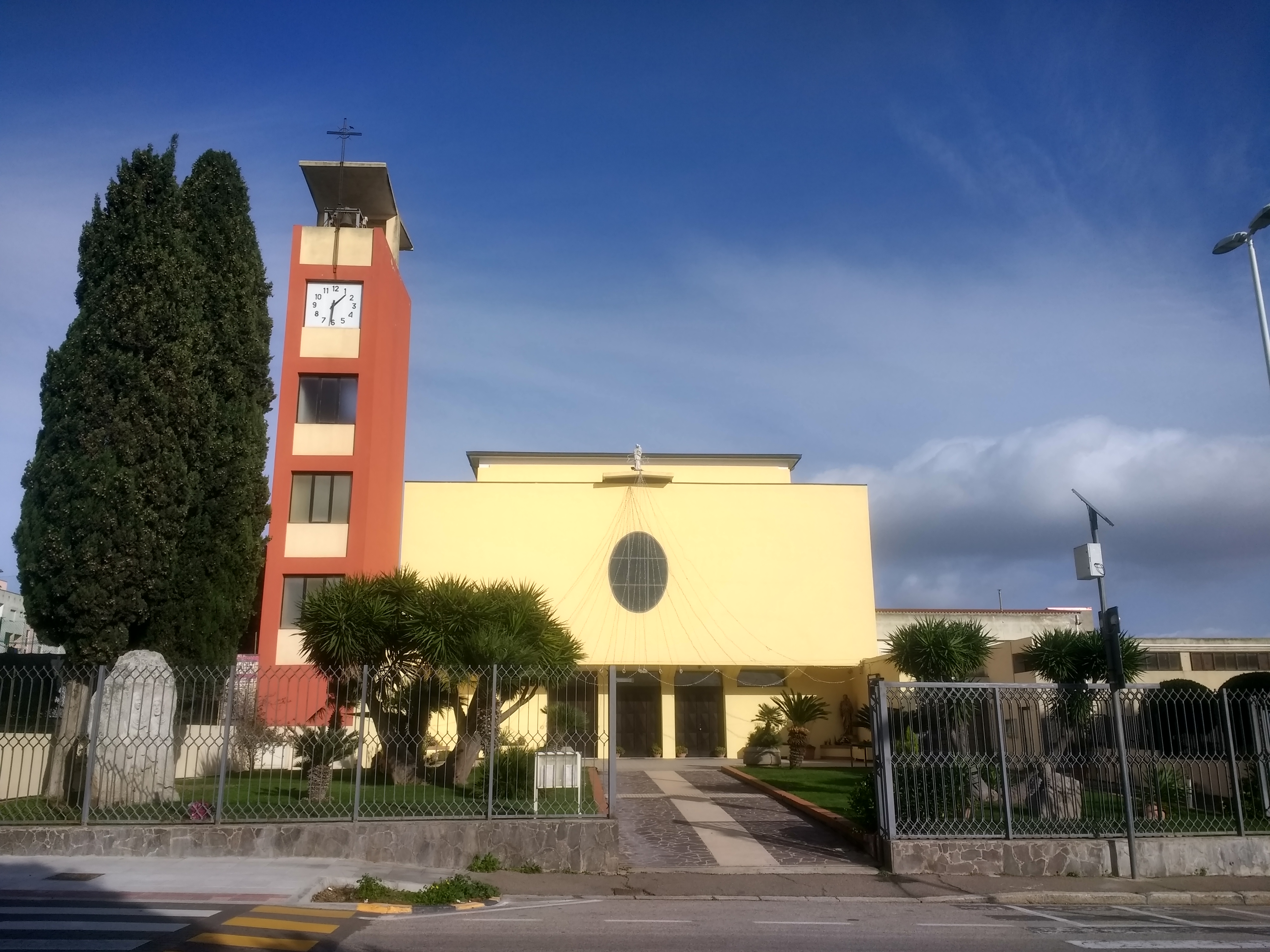 Foto scattata a Pirri nel dicembre 2019